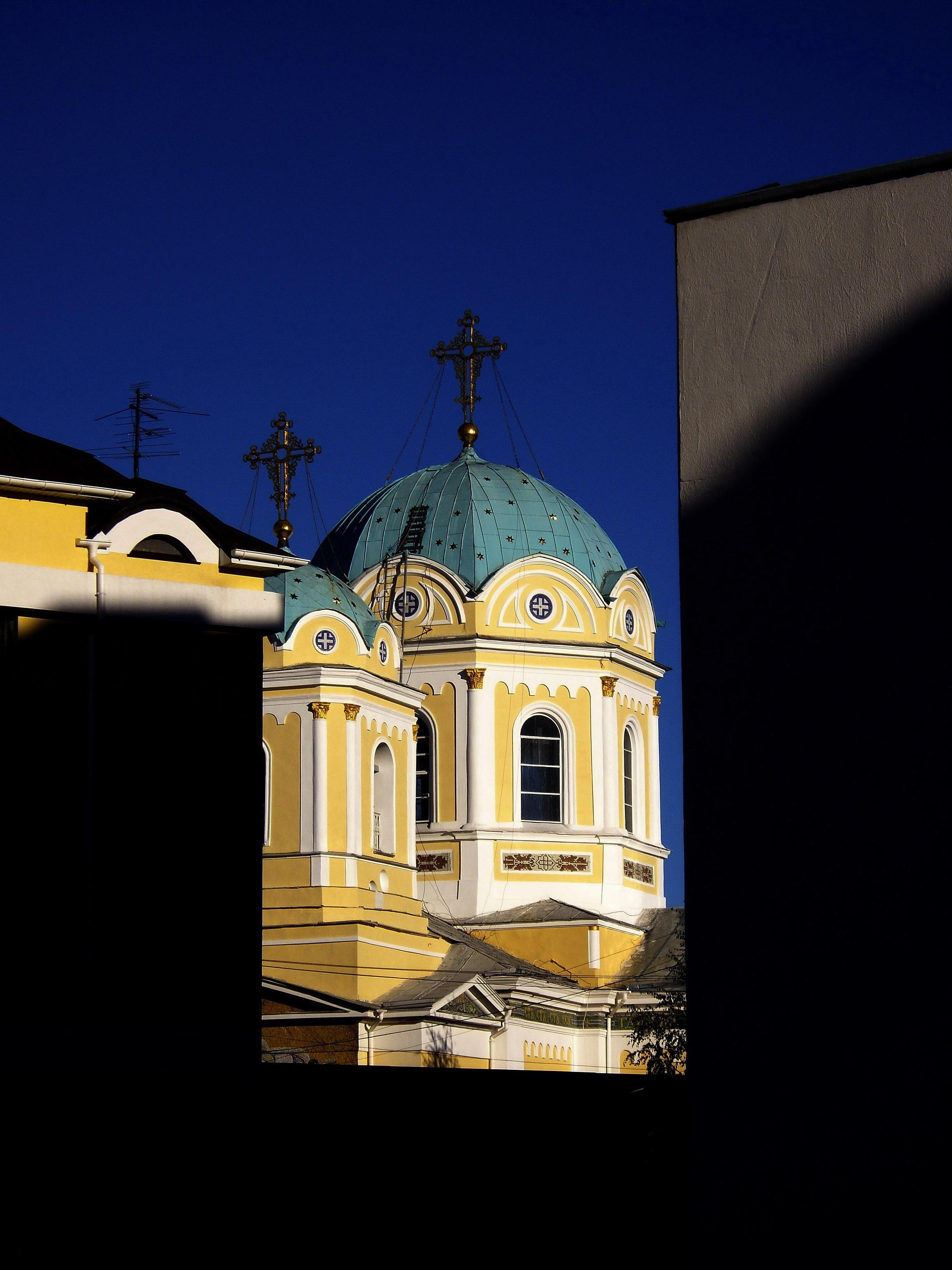 Свято-Троицкий собор ул. Одесская 12